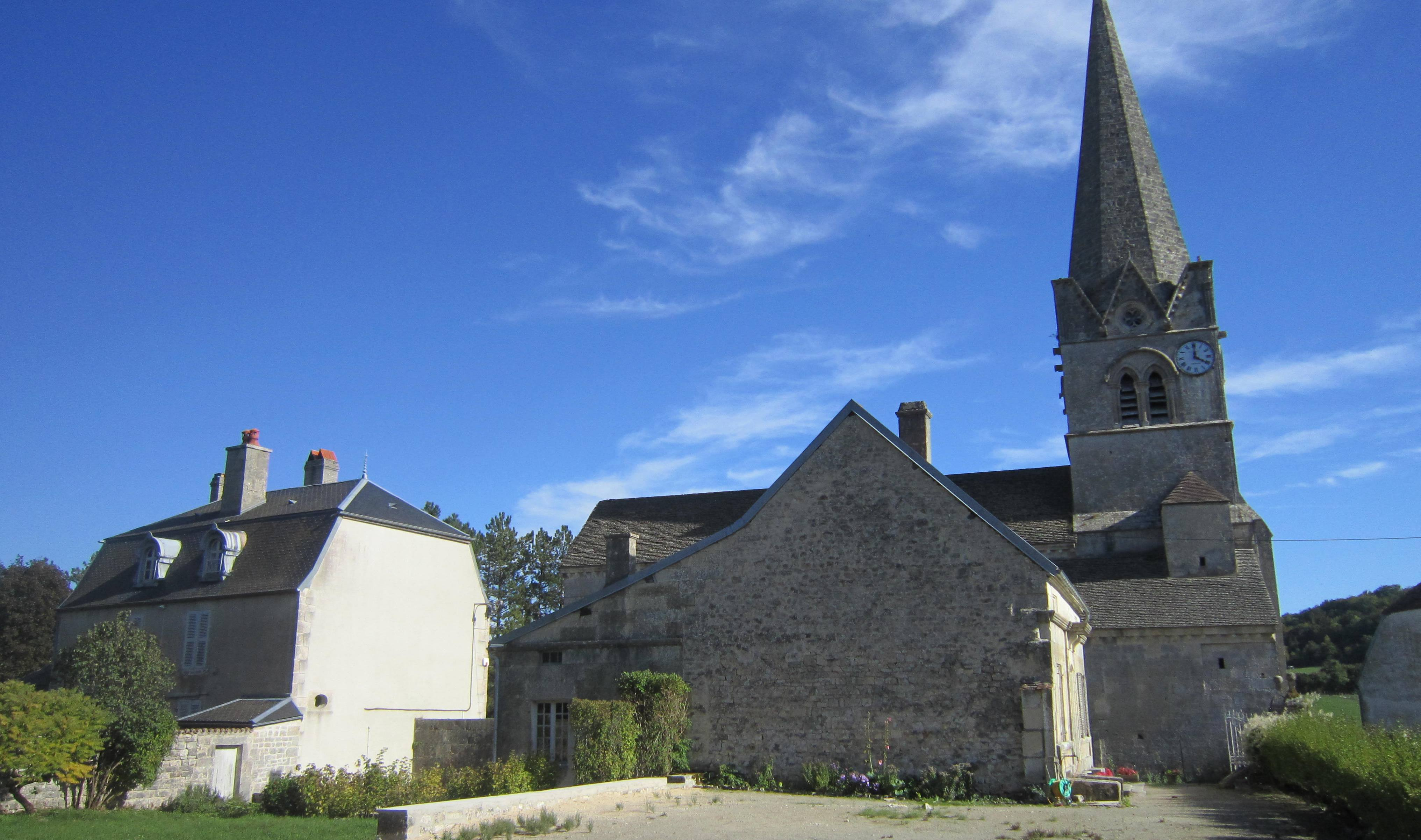 Eglise de Gurgy-le-Château (Côte-d'Or)